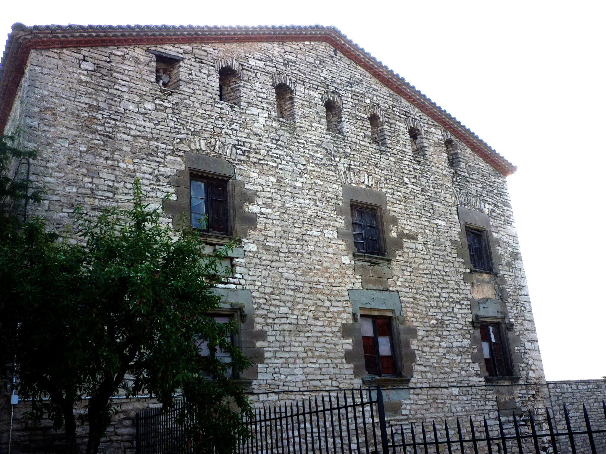 Castell d'Estaràs: façana de ponent